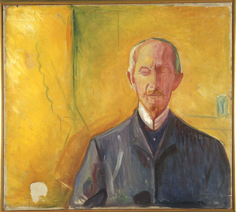 Bildnis Albert Kollmann (1837–1915) von Edvard Munch